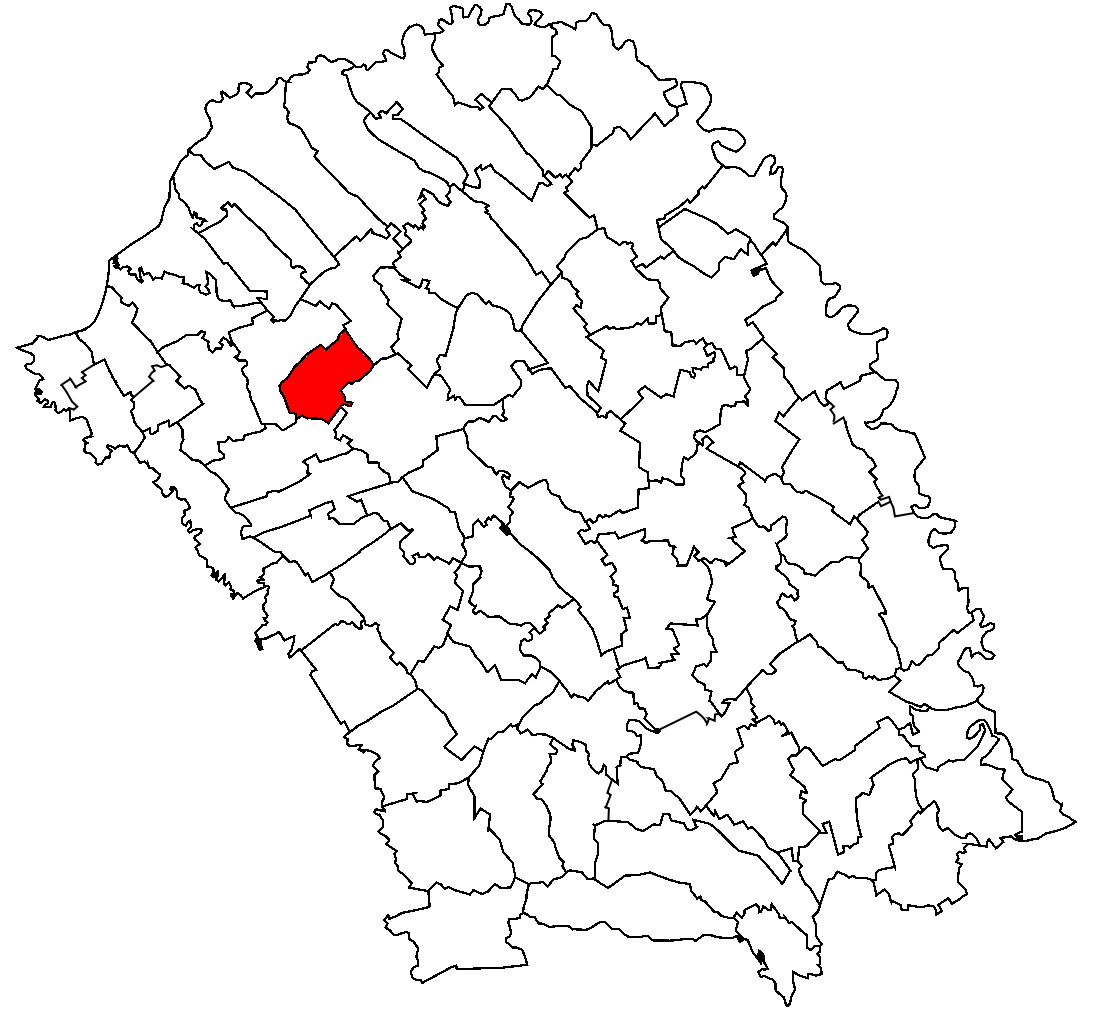 Categorie:Hărţi ale judeţului Botoşani